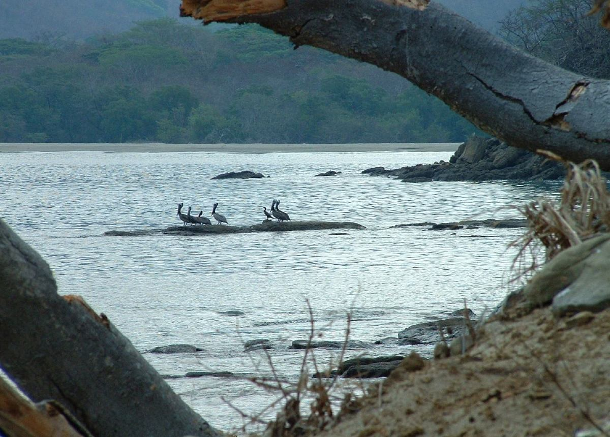 Junquillal Bay Wildlife Refuge, Guanacaste Province, Costa Rica